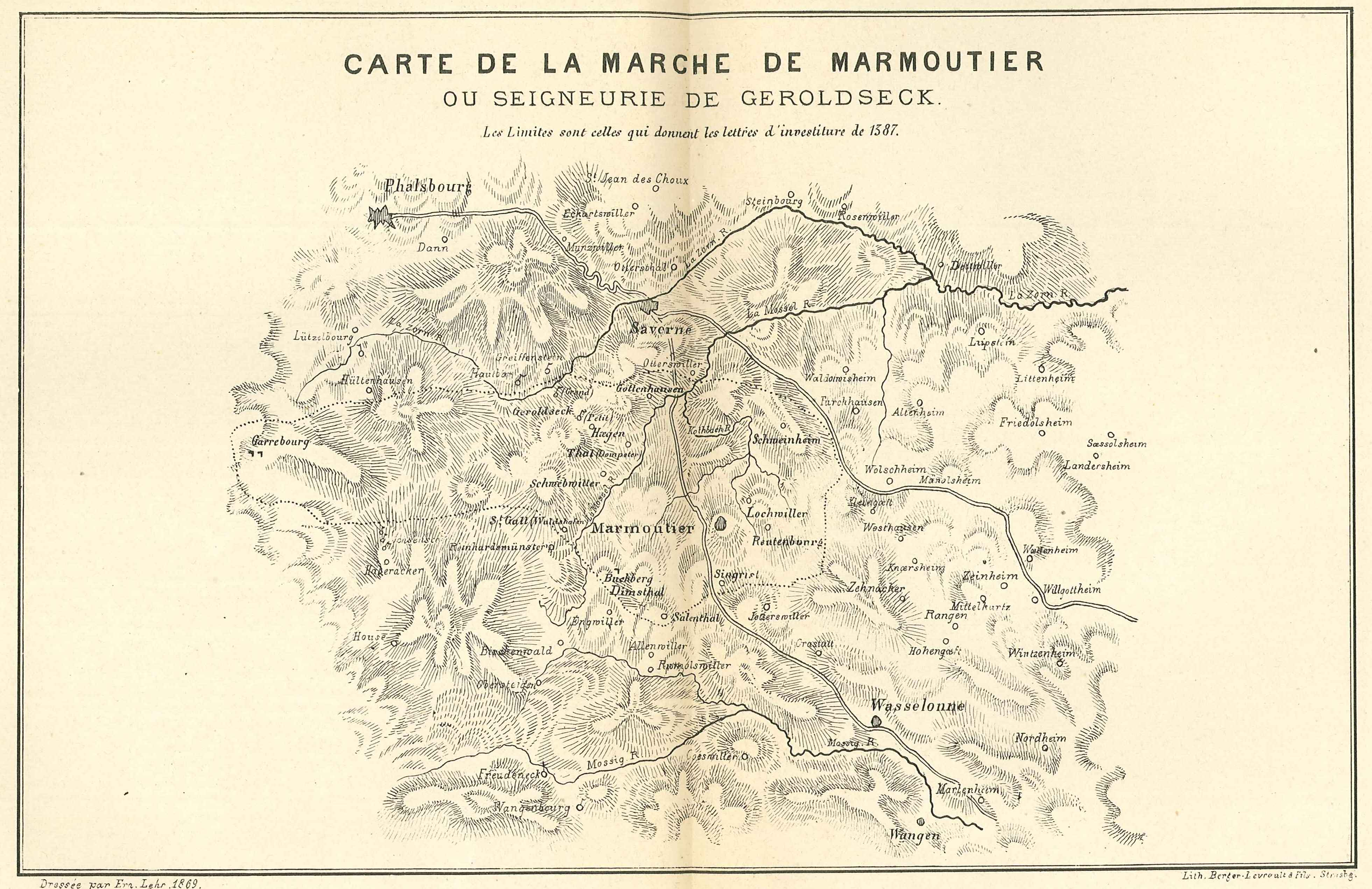 lithographie faite par Berger-Levroult fils et dessinée par Ernest Lehr en 1869.Scan réalisé par la Médiathèque protestante de Strasbourg